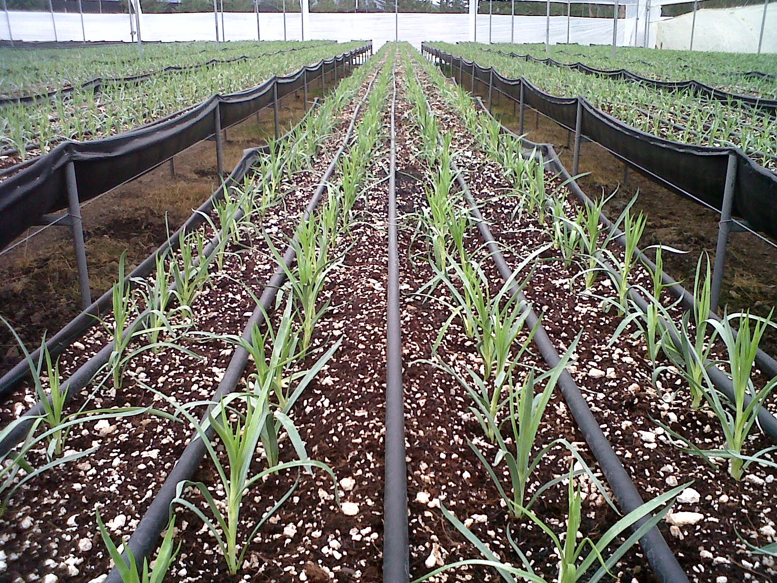 השקיה בטפטפות יונירעם